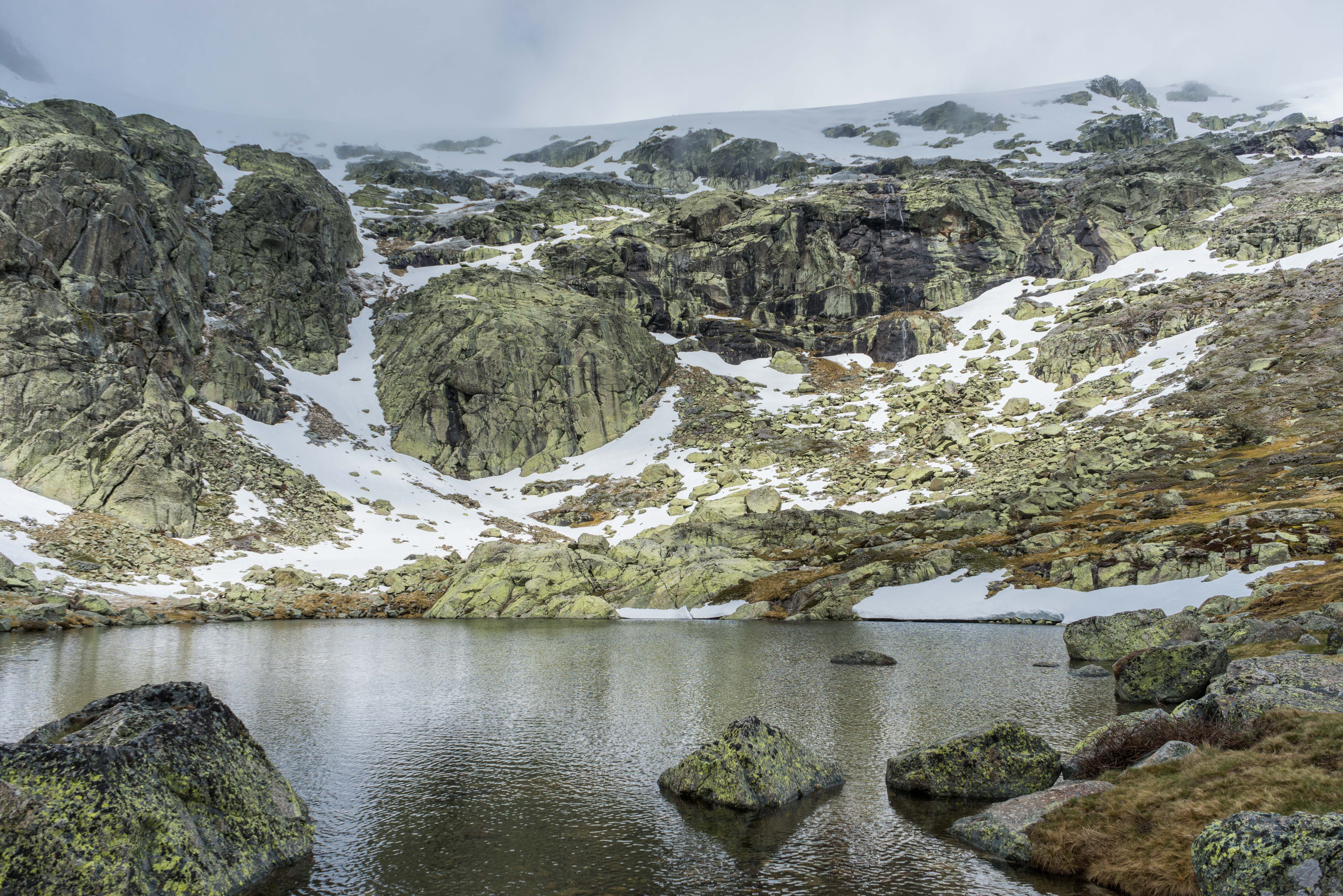 Peñalara (Madrid)